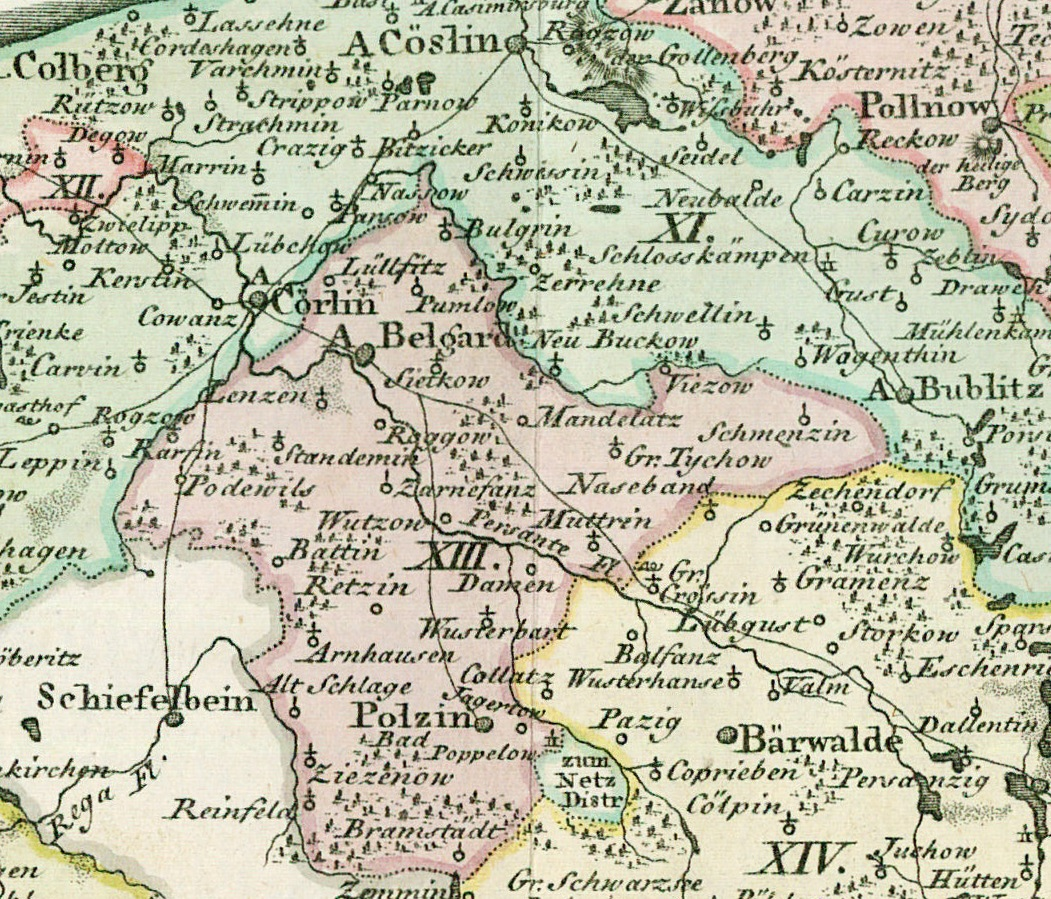 Ausschnitt aus "Landkarte des Herzogtums Vor- und Hinterpommern aus dem Jahr 1794